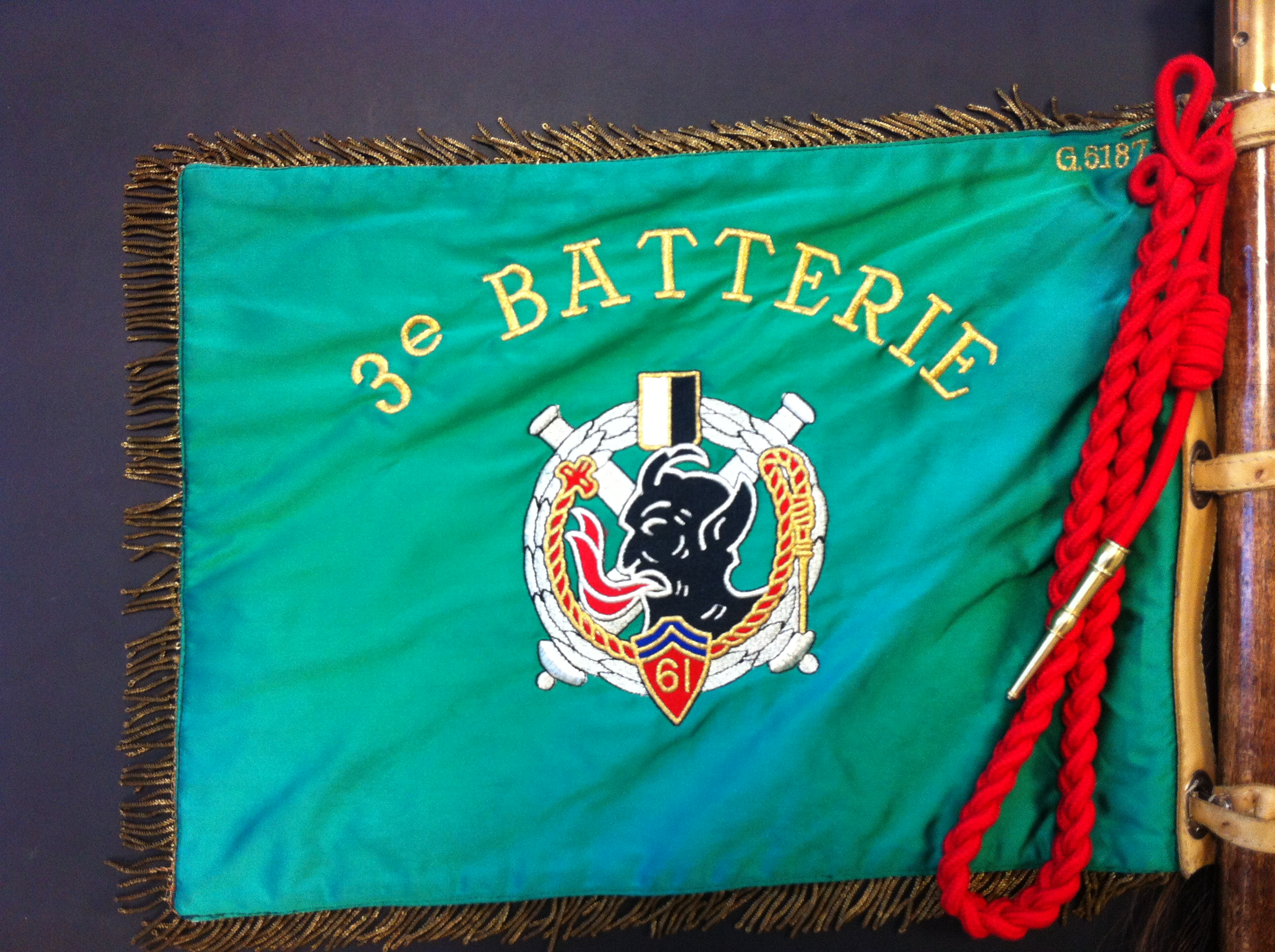 recto du fanion de la 3ième batterie du 61e régiment d'artillerie